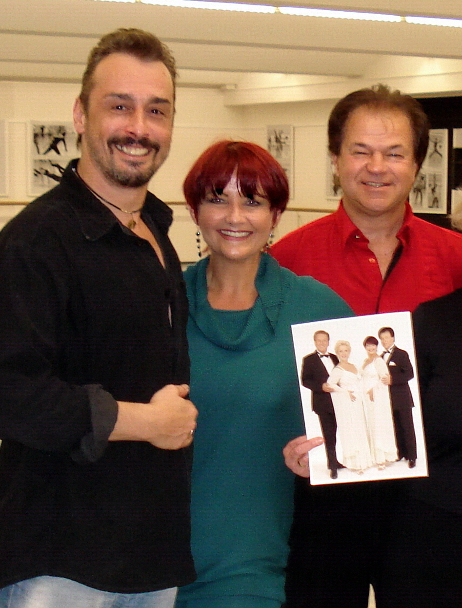 Wilfried Peetz mit Ehefrau Andrea und Choreograph und Fernsehballett-Solist André Höhl im Probensaal des Dt. Fernsehballetts des MDR in Berlin